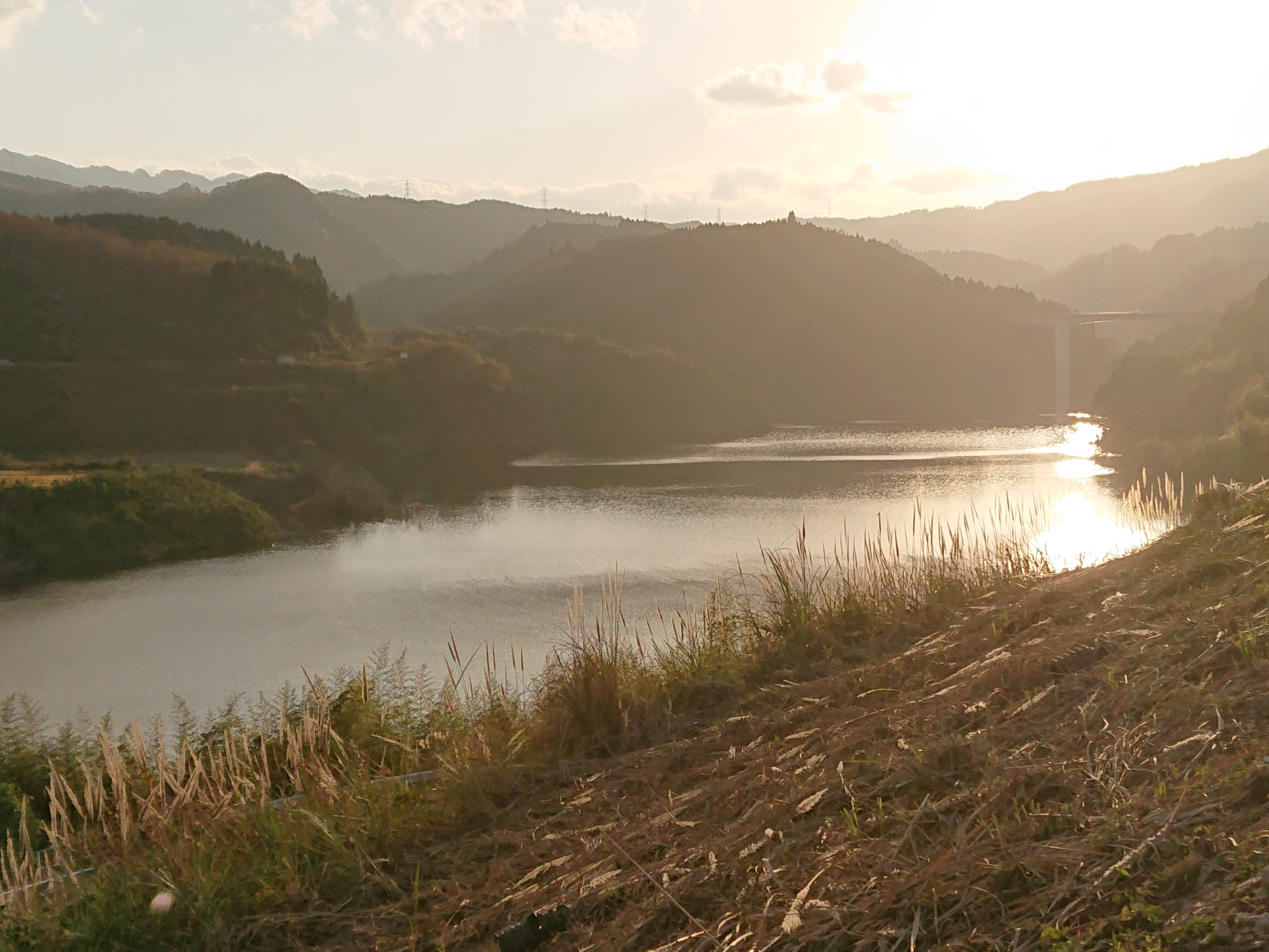 道の駅のつはるから